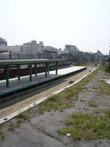 員林市區鐵路高架化臨時月台工程景況。